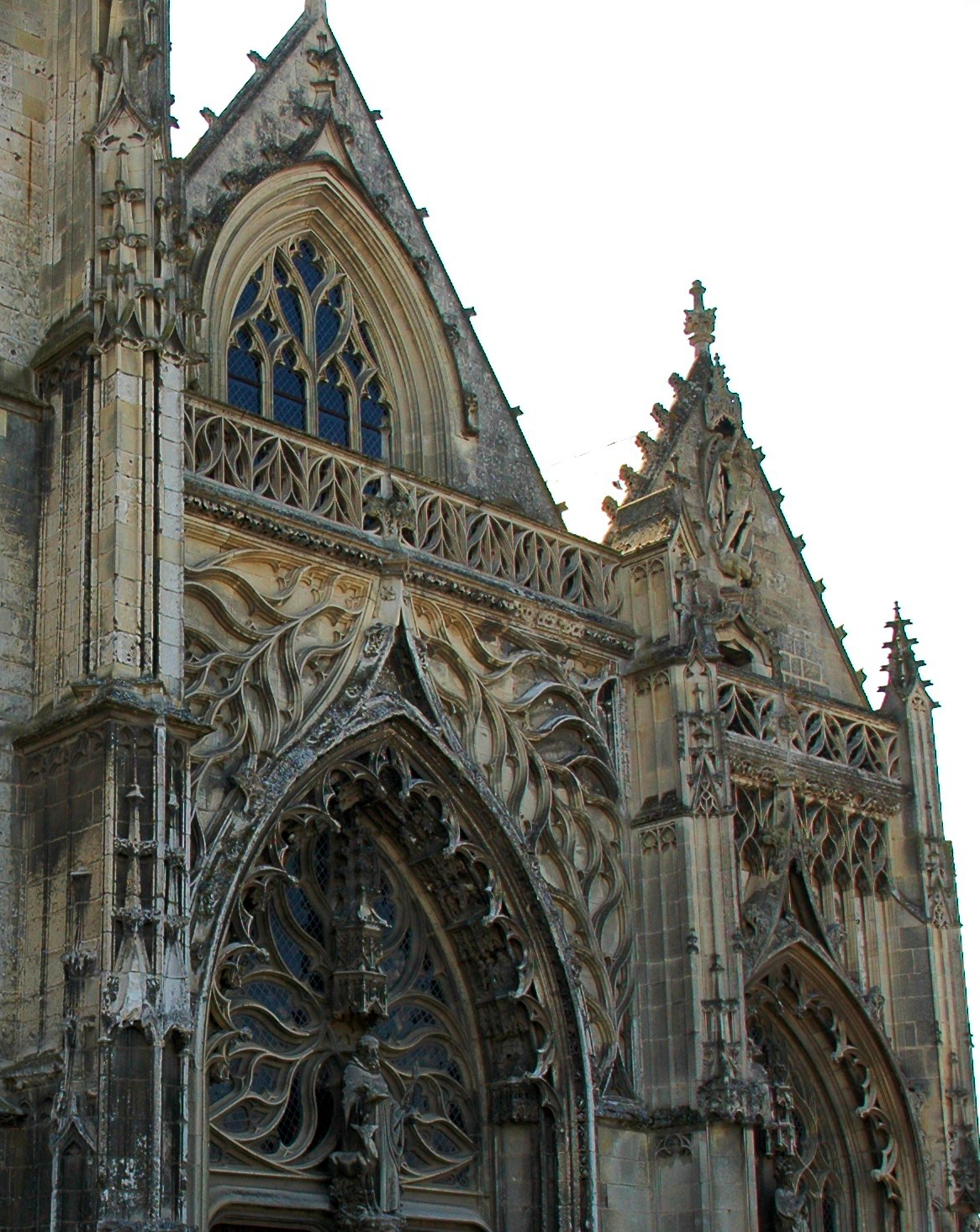 Abbeville (Somme, France). L'église Saint-Gilles.